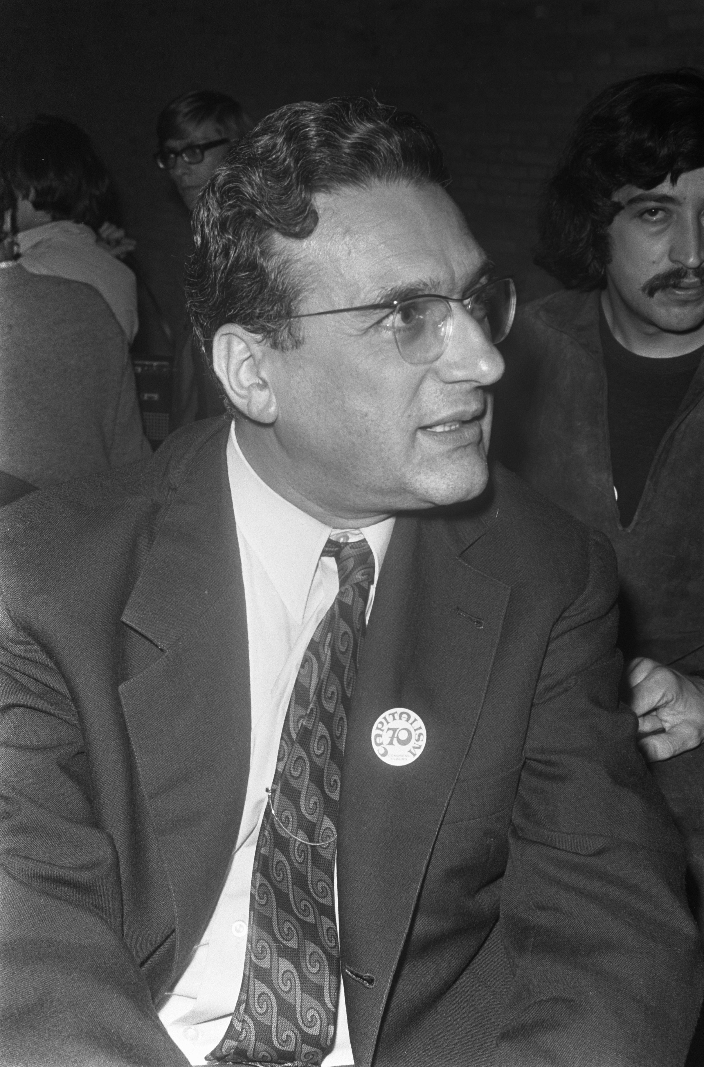 Collectie / Archief : Fotocollectie Anefo Reportage / Serie : [ onbekend ] Beschrijving : Congres over "Kapitalisme in 70-er jaren" in Tilburgse Hogeschool ; nr. 14: Herbert Gintis , kop, nr. 15: Ernest Mandel , kop Datum : 10 september 1970 Trefwoorden : congressen Persoonsnaam : Ernest Mandel Fotograaf : Koch, Eric / Anefo Auteursrechthebbende : Nationaal Archief Materiaalsoort : Negatief (zwart/wit) Nummer archiefinventaris : bekijk toegang 2.24.01.05 Bestanddeelnummer : 923-8345